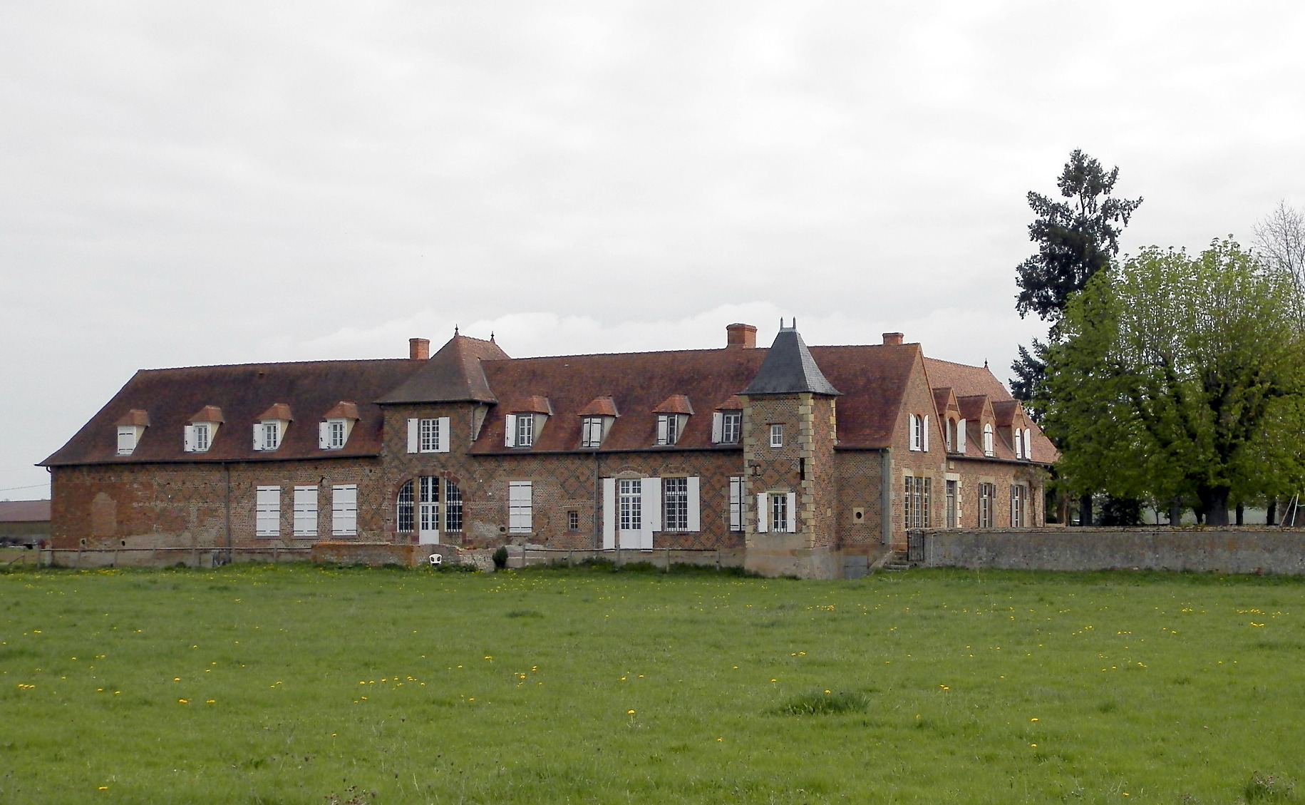 Le moutier arriere